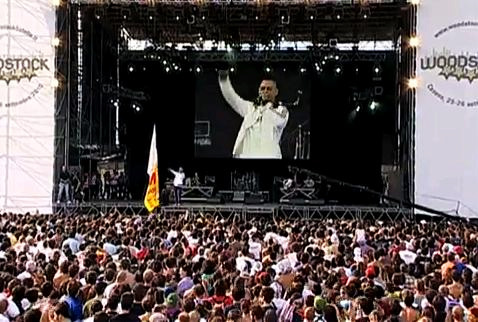 Fabri Fibra a Woodstock 5 stelle